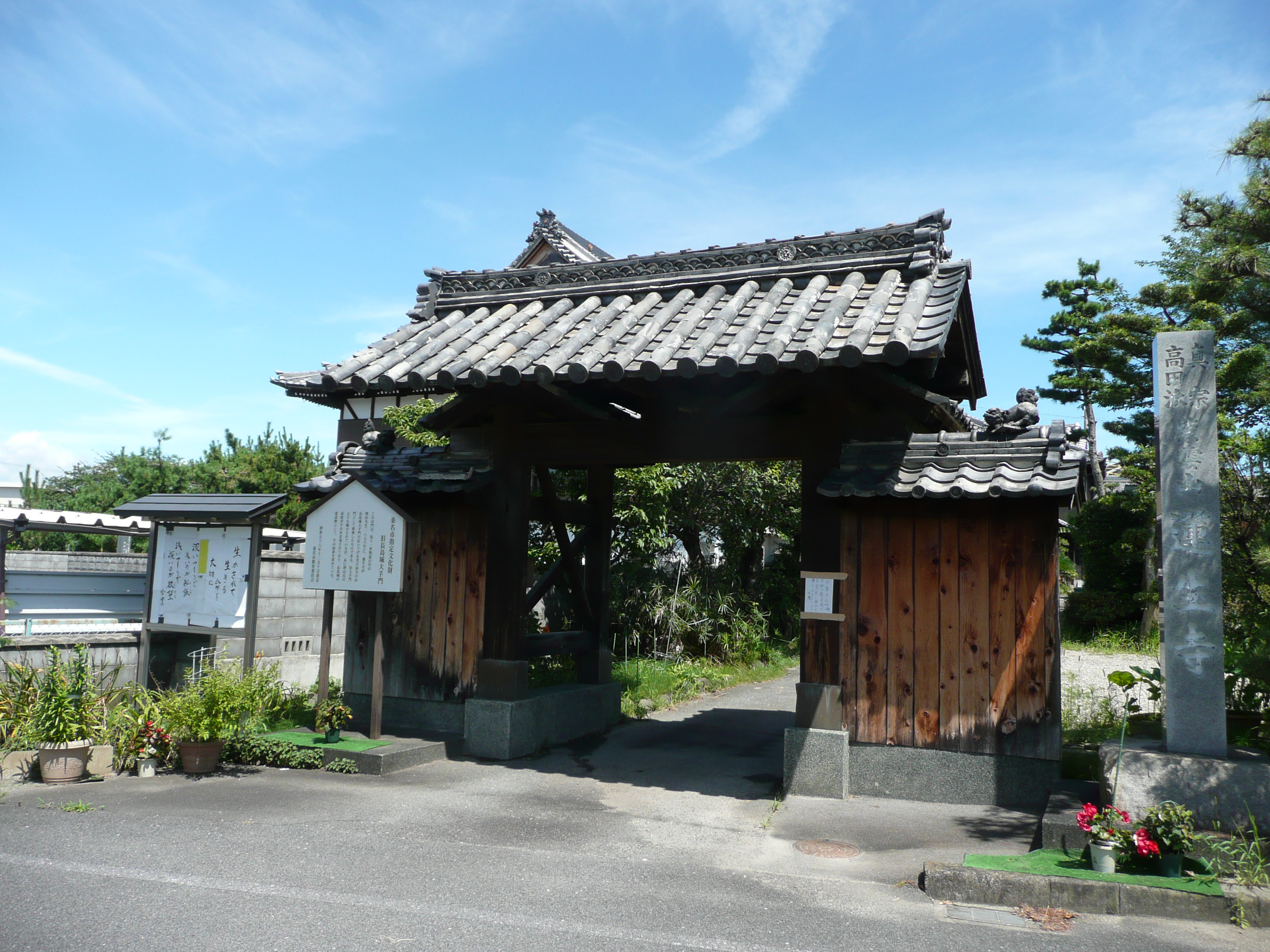 長島城（伊勢国）の大手門